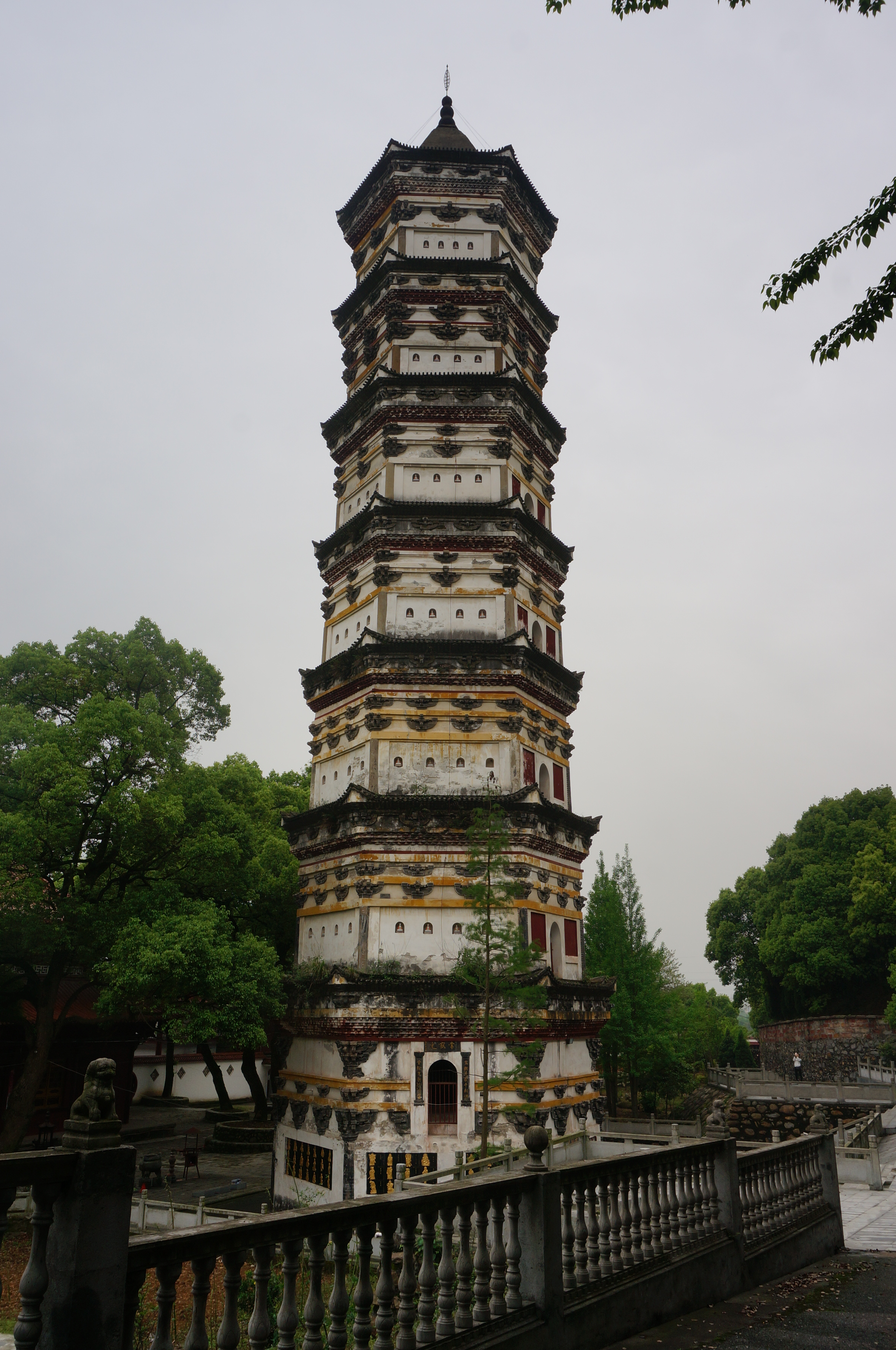 庐山西林寺，西林寺塔，东北面。